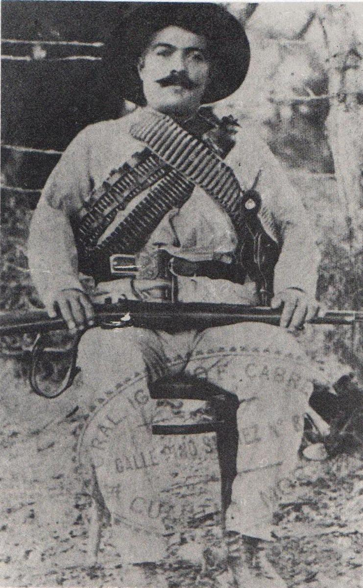 General Ignacio Cabrera